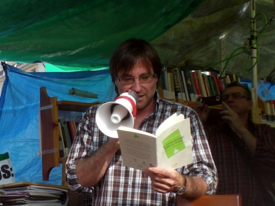 Francisco López Serrano en un recital poético en la acampada del 15 M en Madrid